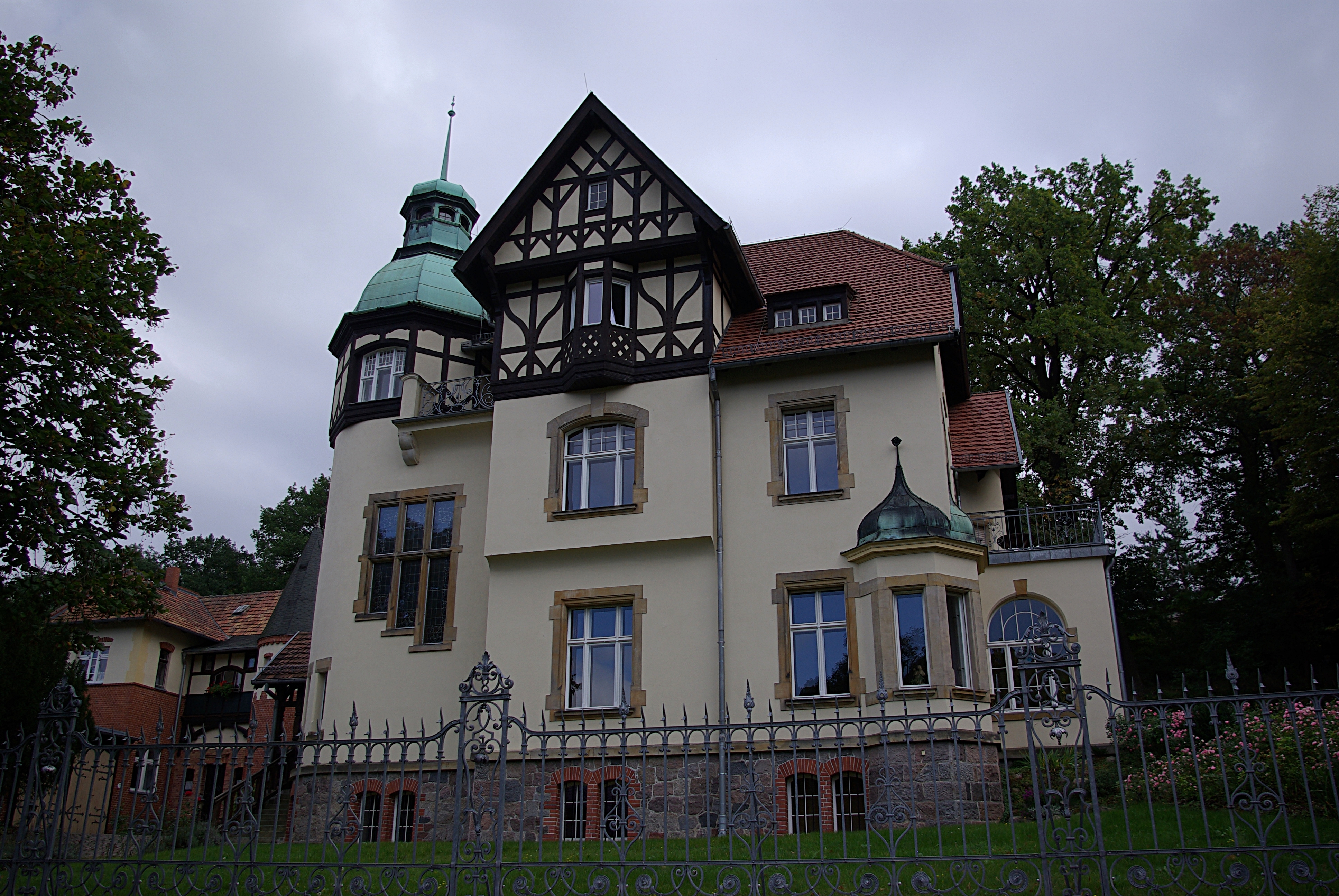 Bad Freienwalde in Brandenburg. Das Haus Goethestraße 17 steht unter Denkmalschutz.